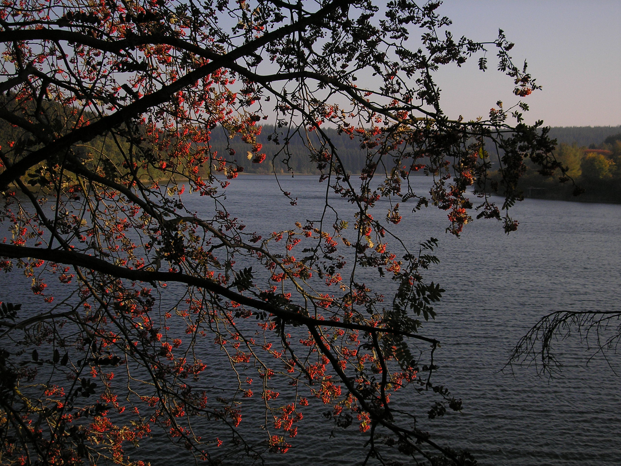 Stausee bei Bütgenbach, Province Lüttich, Belgien